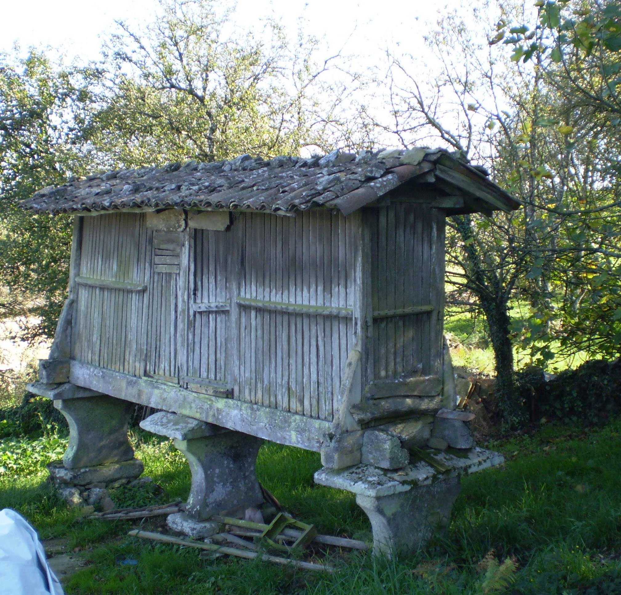 Hórreo con armazón íntegramente de madeira, elevado sobre tres cepas copiformes. Cuberta de tella do país e con porta penal. Ubicado no lugar de Timós, parroquia de O Rial (Antas de Ulla)